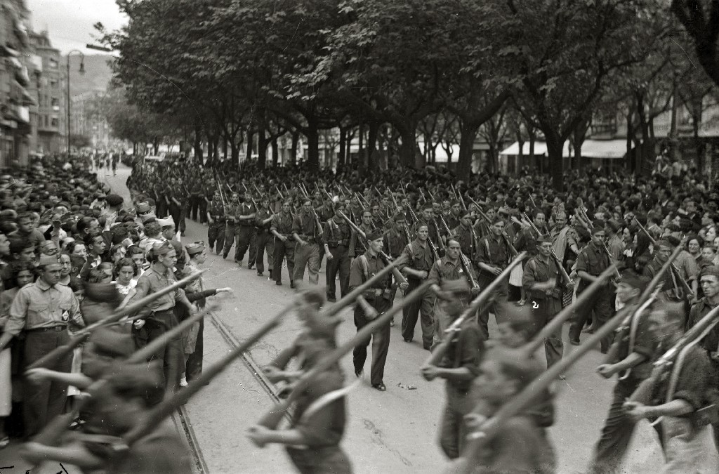 Título original: Recibimiento a las tropas del bando nacional (4/34) Localización: San Sebastián (Guipúzcoa)